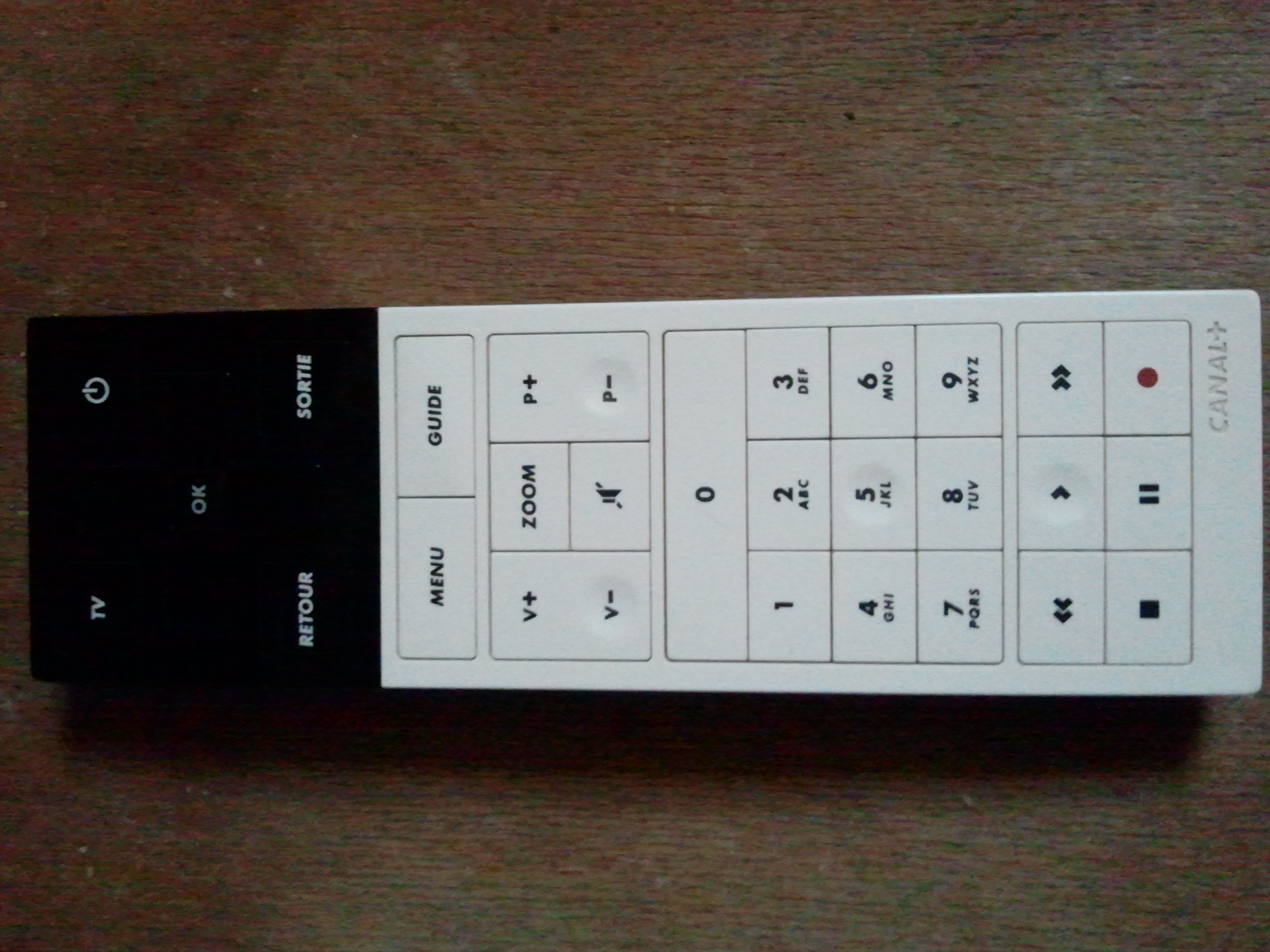 ancienne télécommande +Le Cube avec bouton enfoncés